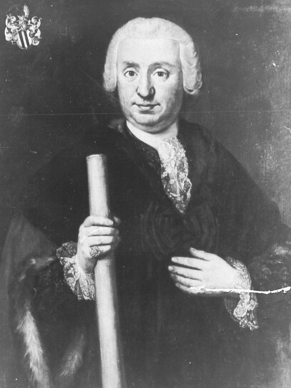 Porträt des Melchior Ditmar von Wittgenstein, Kölner Bürgermeister 1777/1784